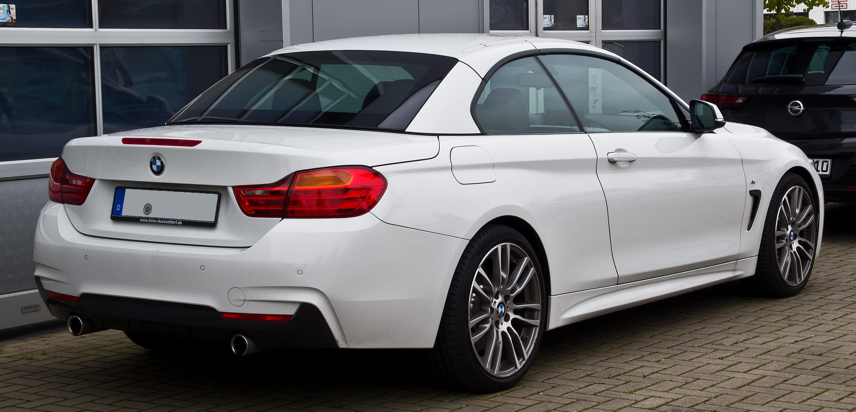 BMW 435i Cabriolet M Sport (F33)